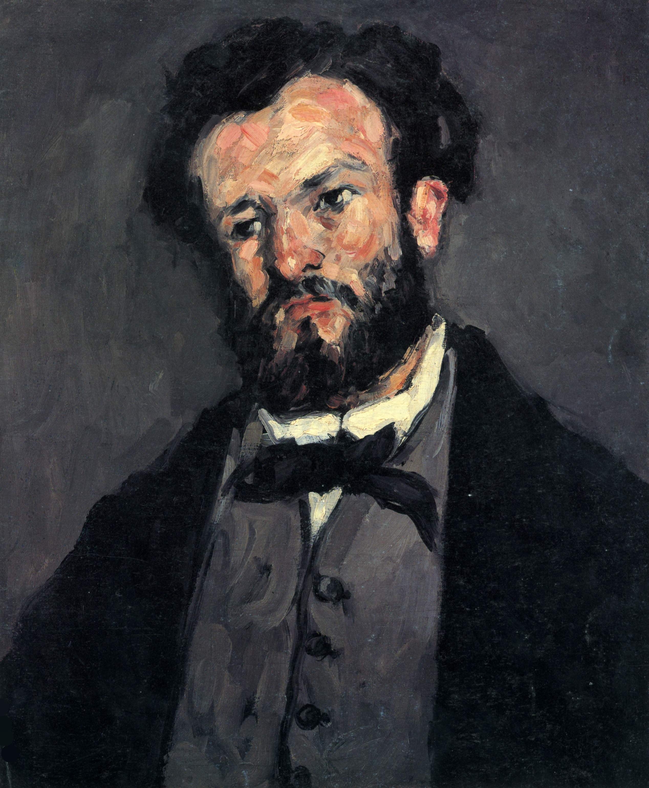 Porträt des Antony Valabrègue